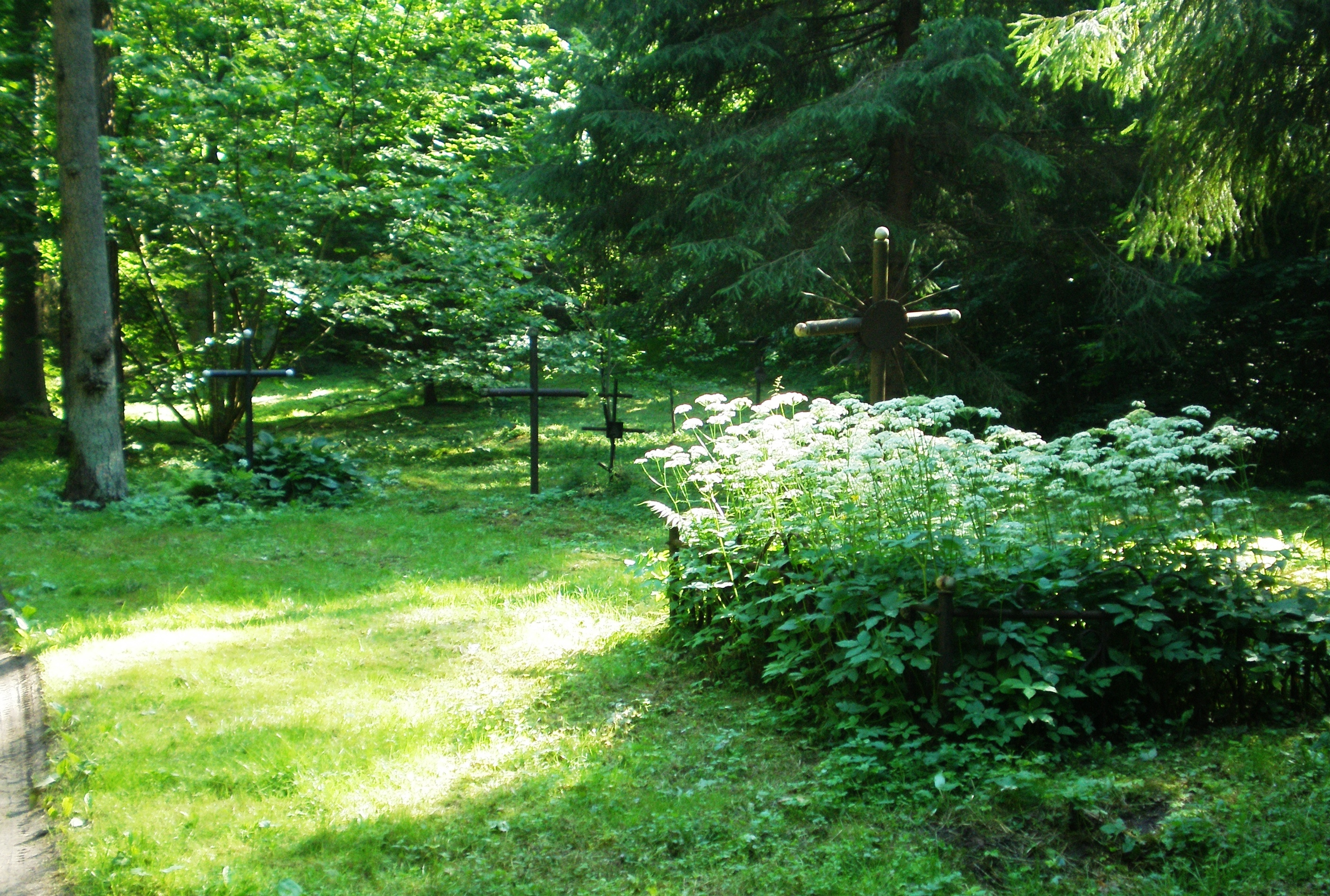 Našlaičių kapinės, Antakalnis, Vilnius